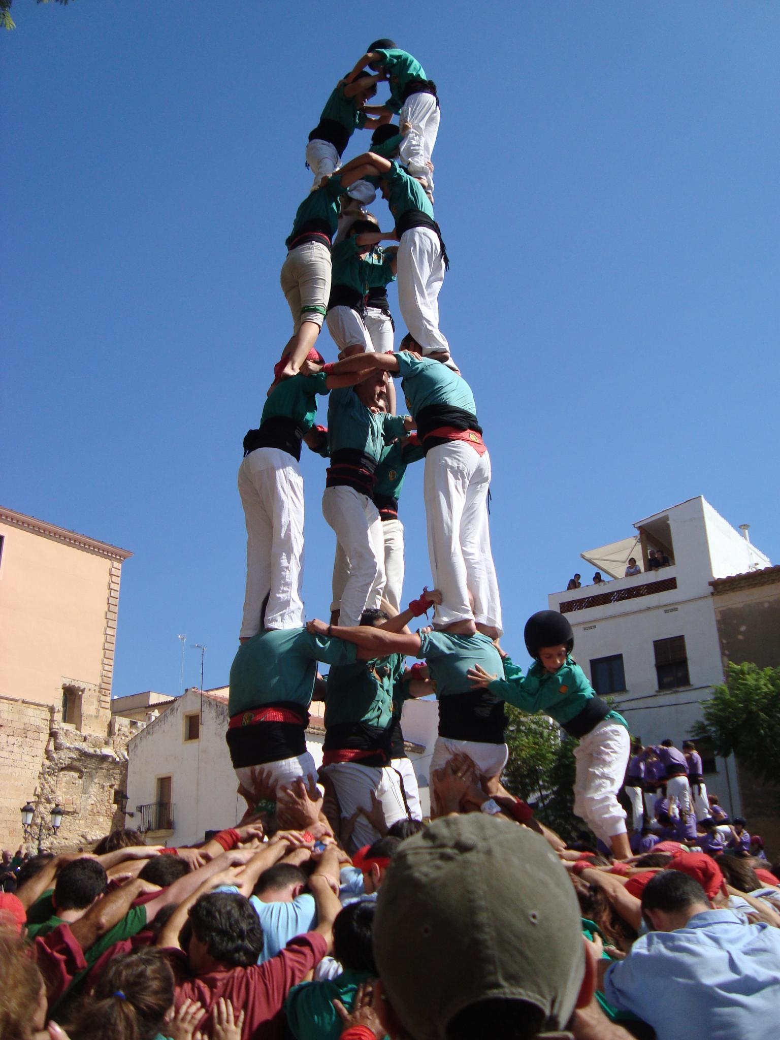 3de7a de la Colla Jove de l'Hospitalet al Concur7 2011,a Torredembarra